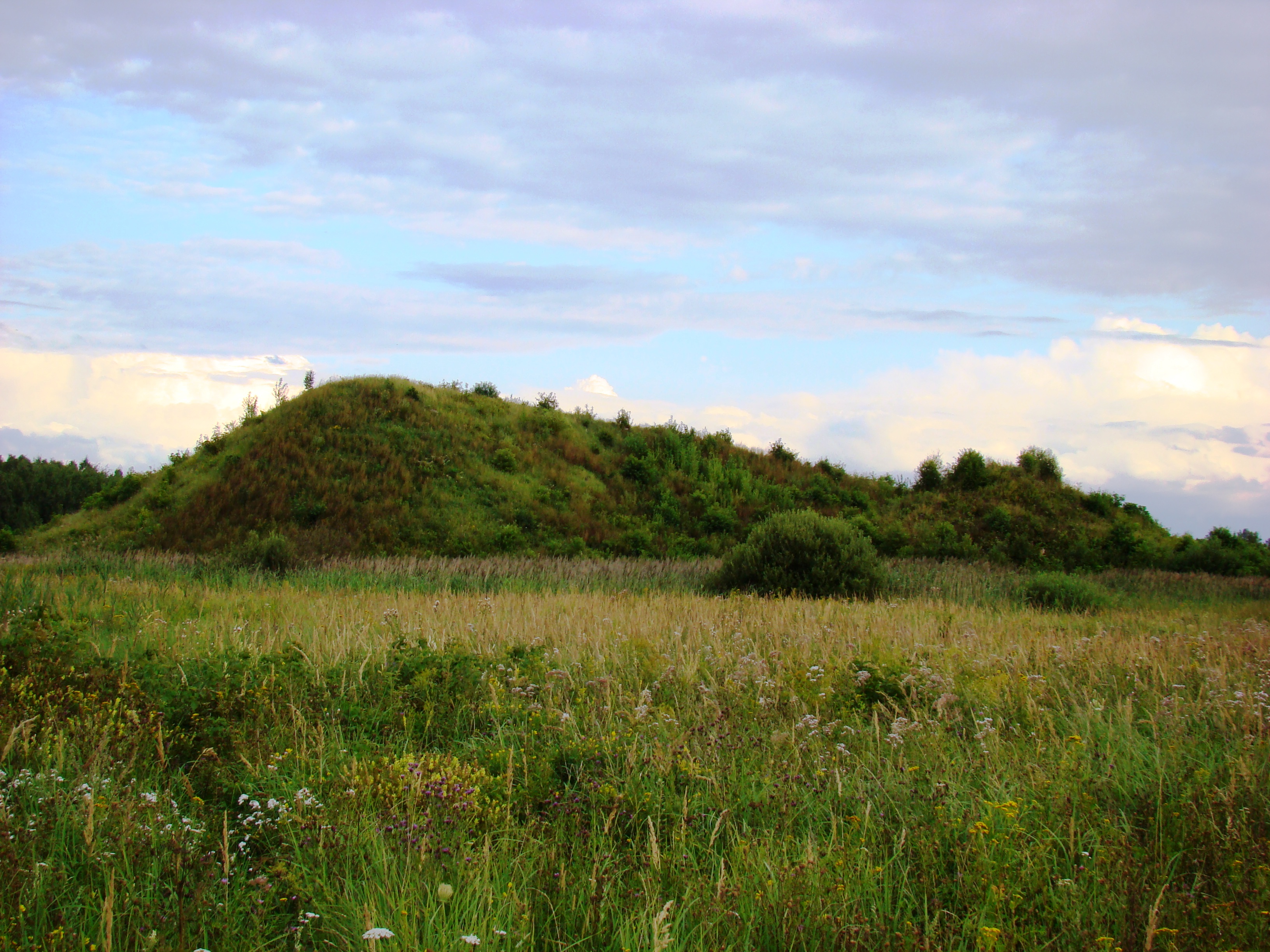 Dwie hałdy kopalni rud żelaza "Karol" w Dźbowie